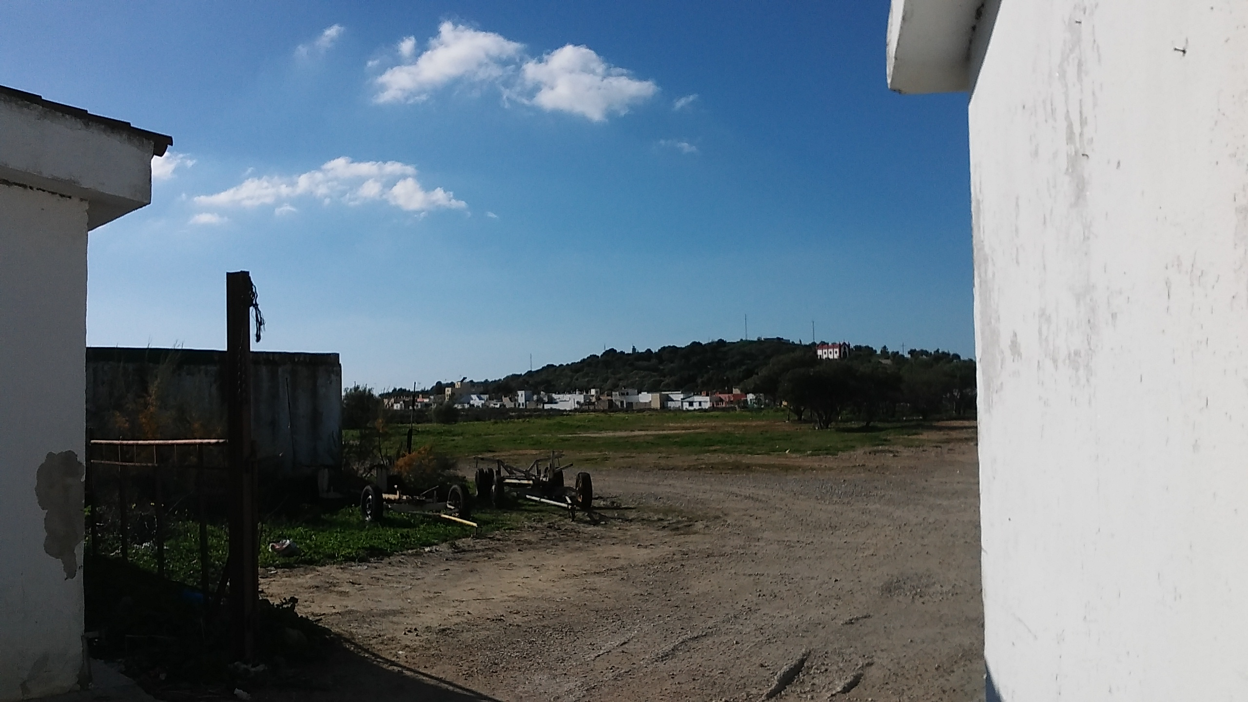 Ermita de los Mártires San Servando y San Germán en el Cerro de los Mártires (Barriada de Gallineras, San Fernando)